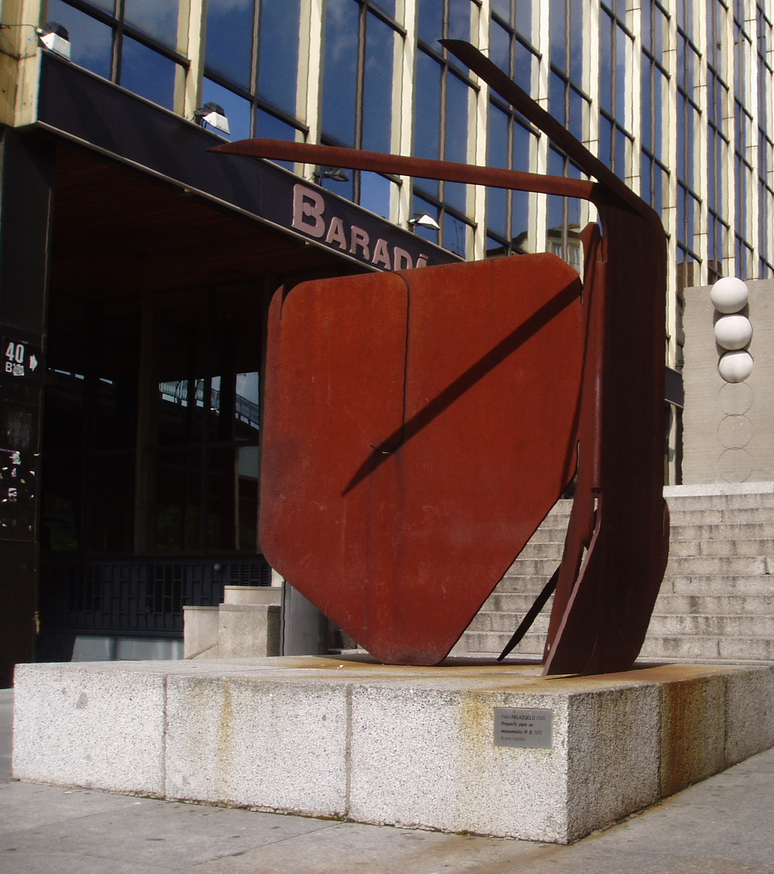 Proyecto para un monumento IV B. Pablo Palazuelo. Museo Arte Público. Madrid. España